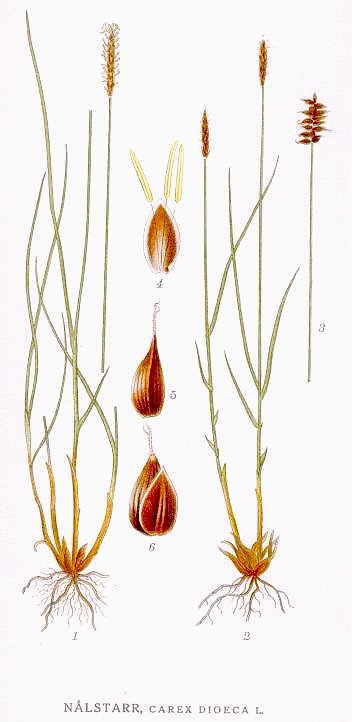 Carex dioica L. Original Description Nålstarr, Carex dioeca L.